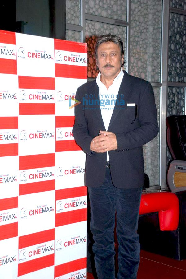 Jackie Shroff at Premiere of Maalik Ek